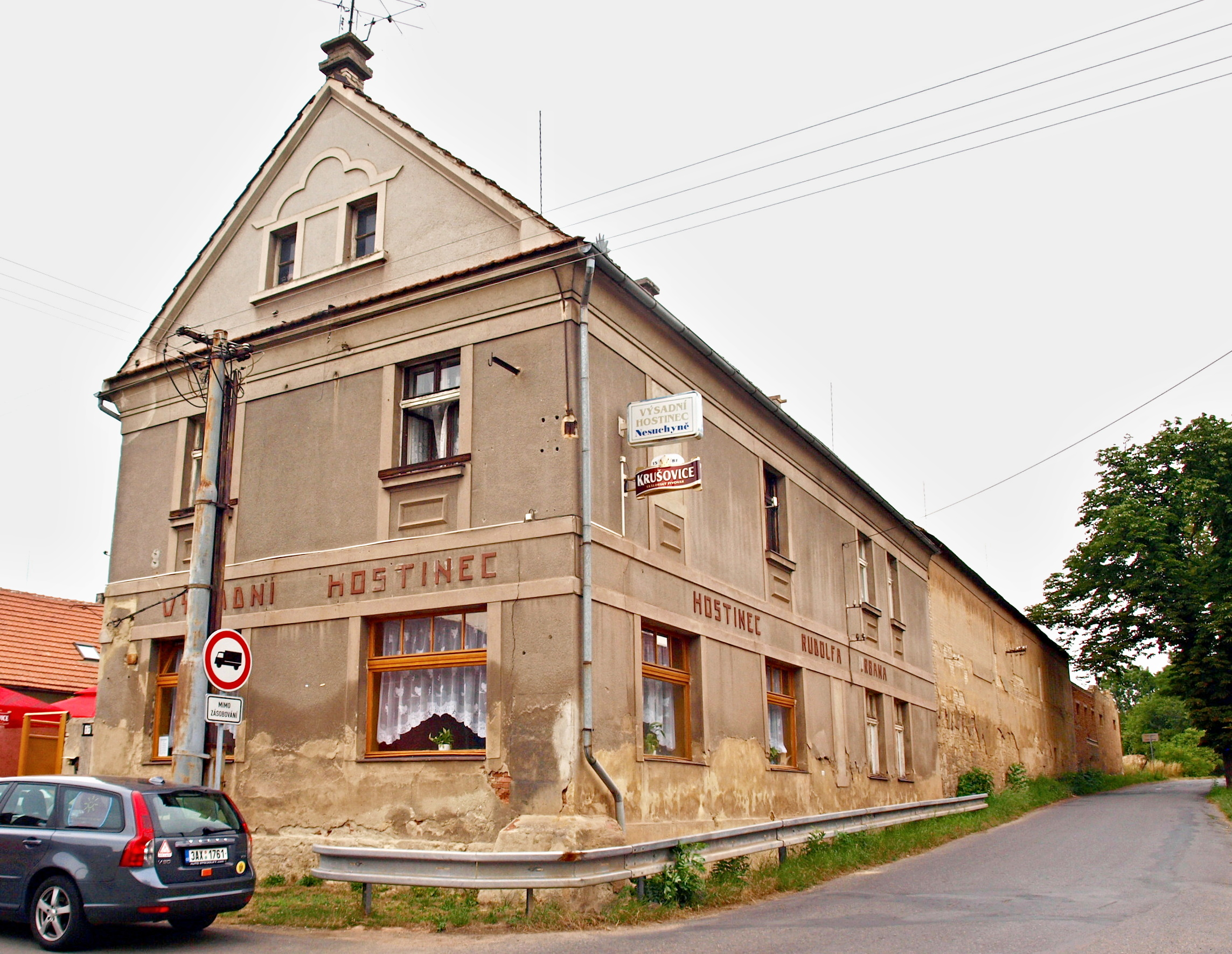 Nesuchyně